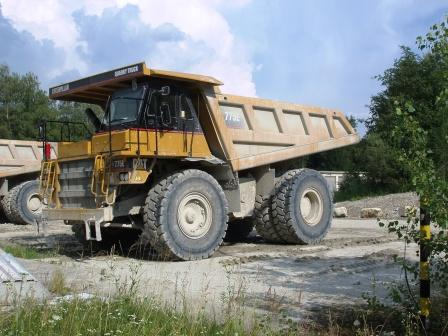 Steinbruch Retznei